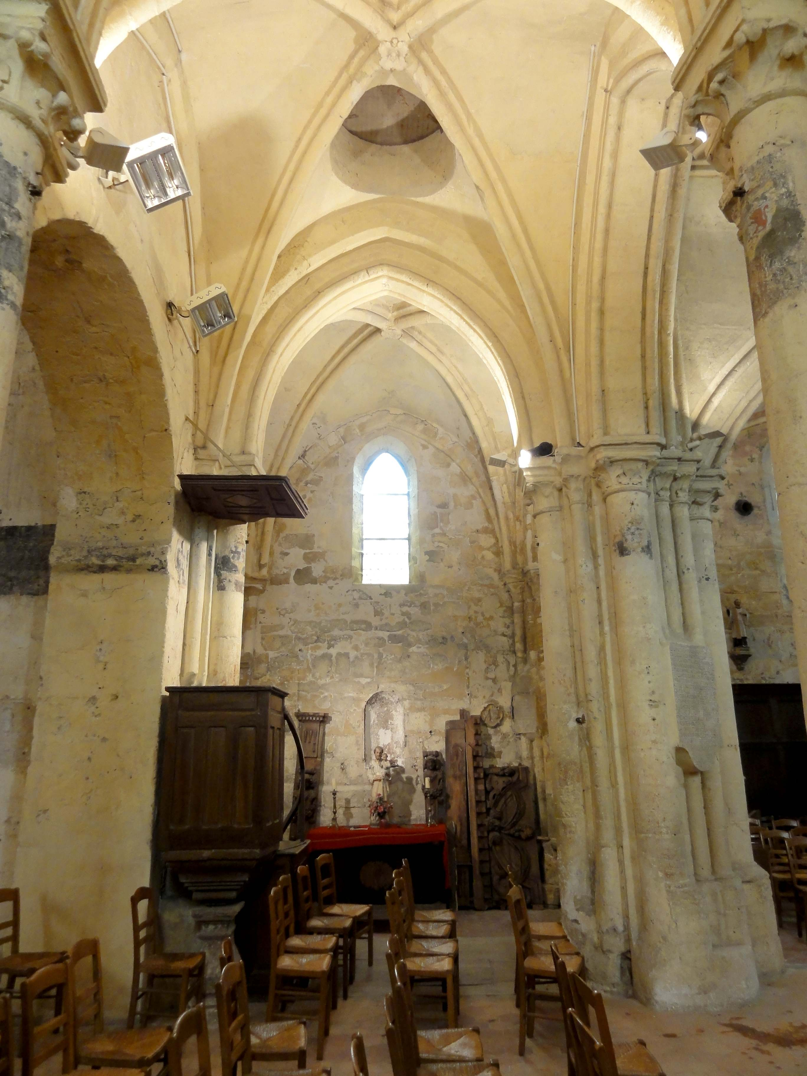 Intérieur de l'église (voir titre).